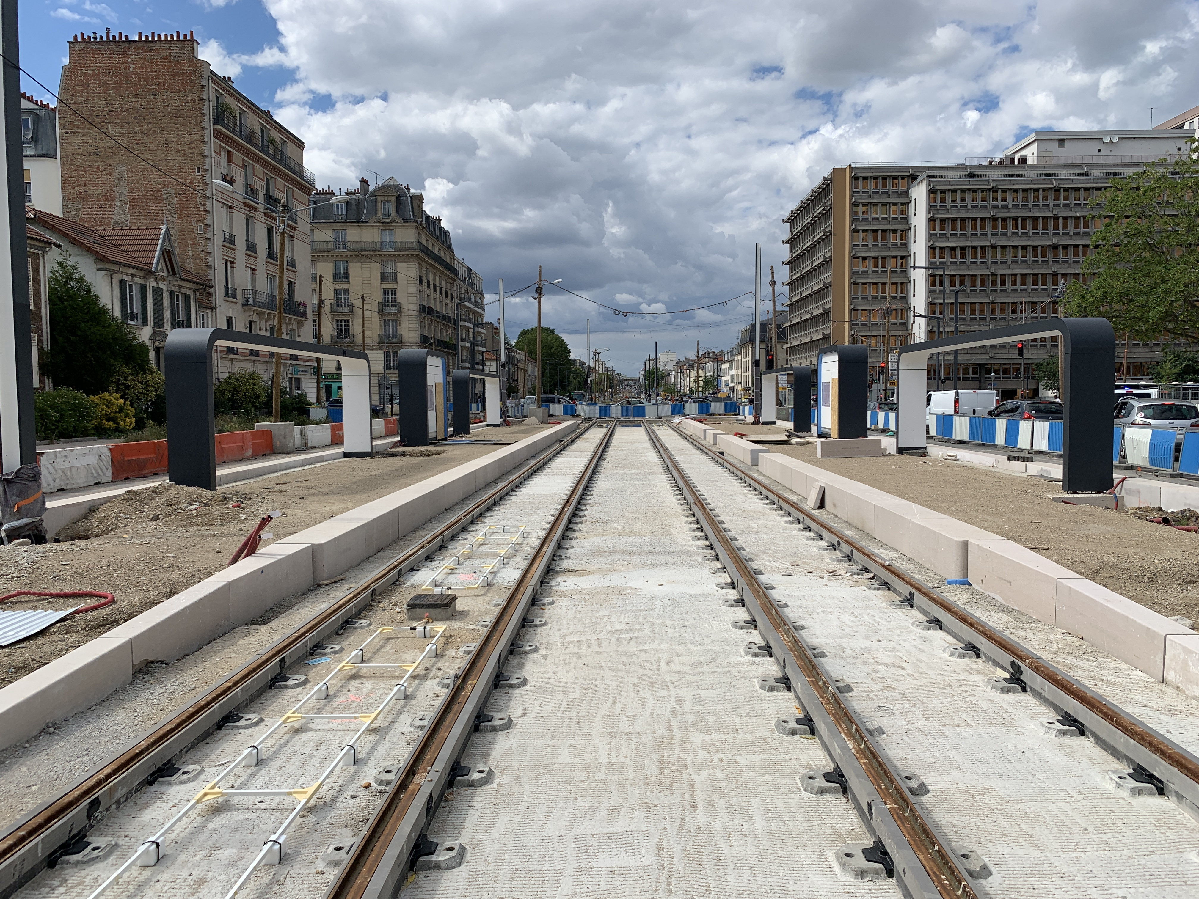 Chantier de la station de tramway Rouget de Lisle, ligne 9 du tramway d'Île-de-France, Choisy-le-Roi.